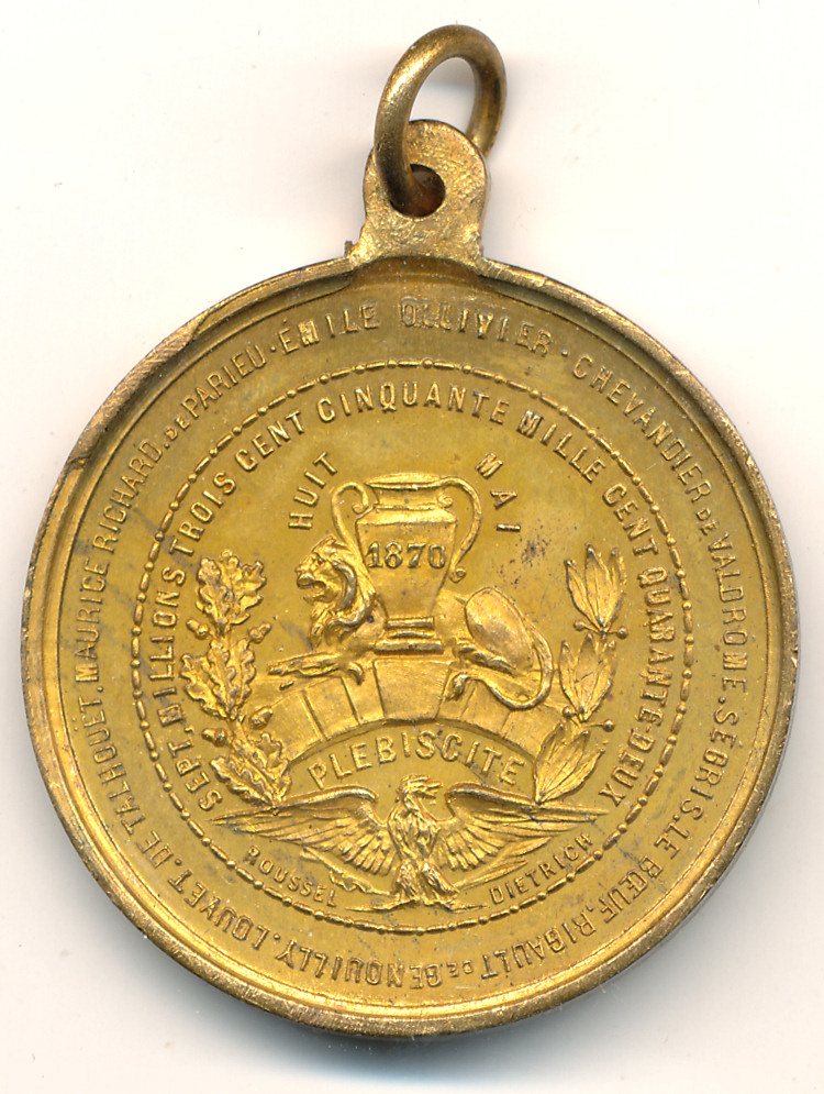 Médaille en bronze doré frappée pour le plébiscite du 8 mai 1870, 35mm.